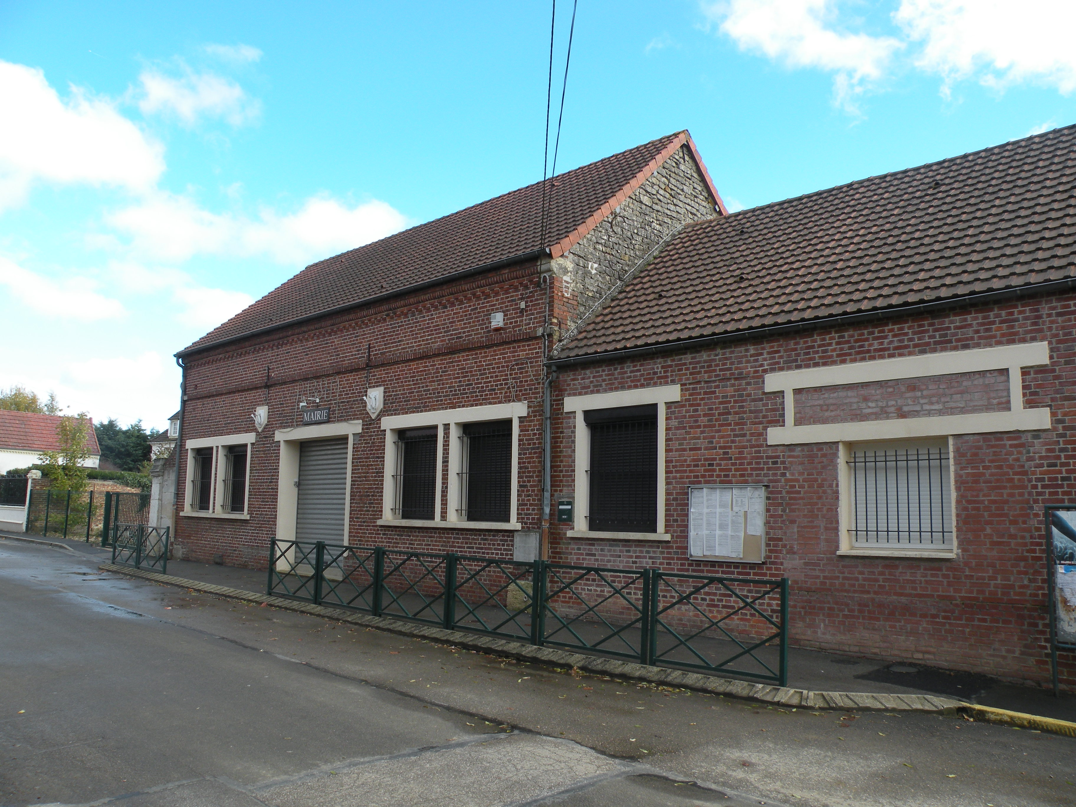 Lachapelle-Saint-Pierre mairie